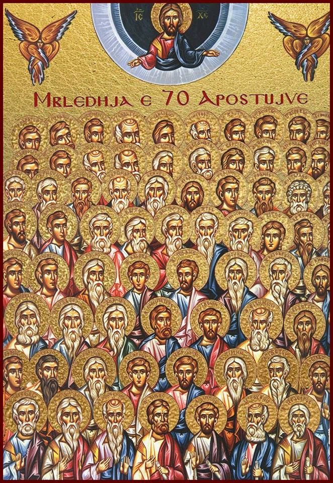 Ikonë e të Shtatëdhjetë Apostujve, të cilët i kujtojmë së bashku më 4 Janar.